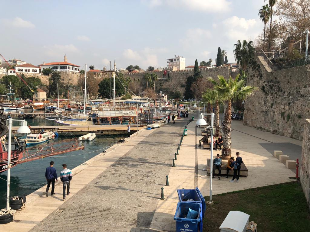 احدى الموانئ السياحية في انطاليا في تركيا